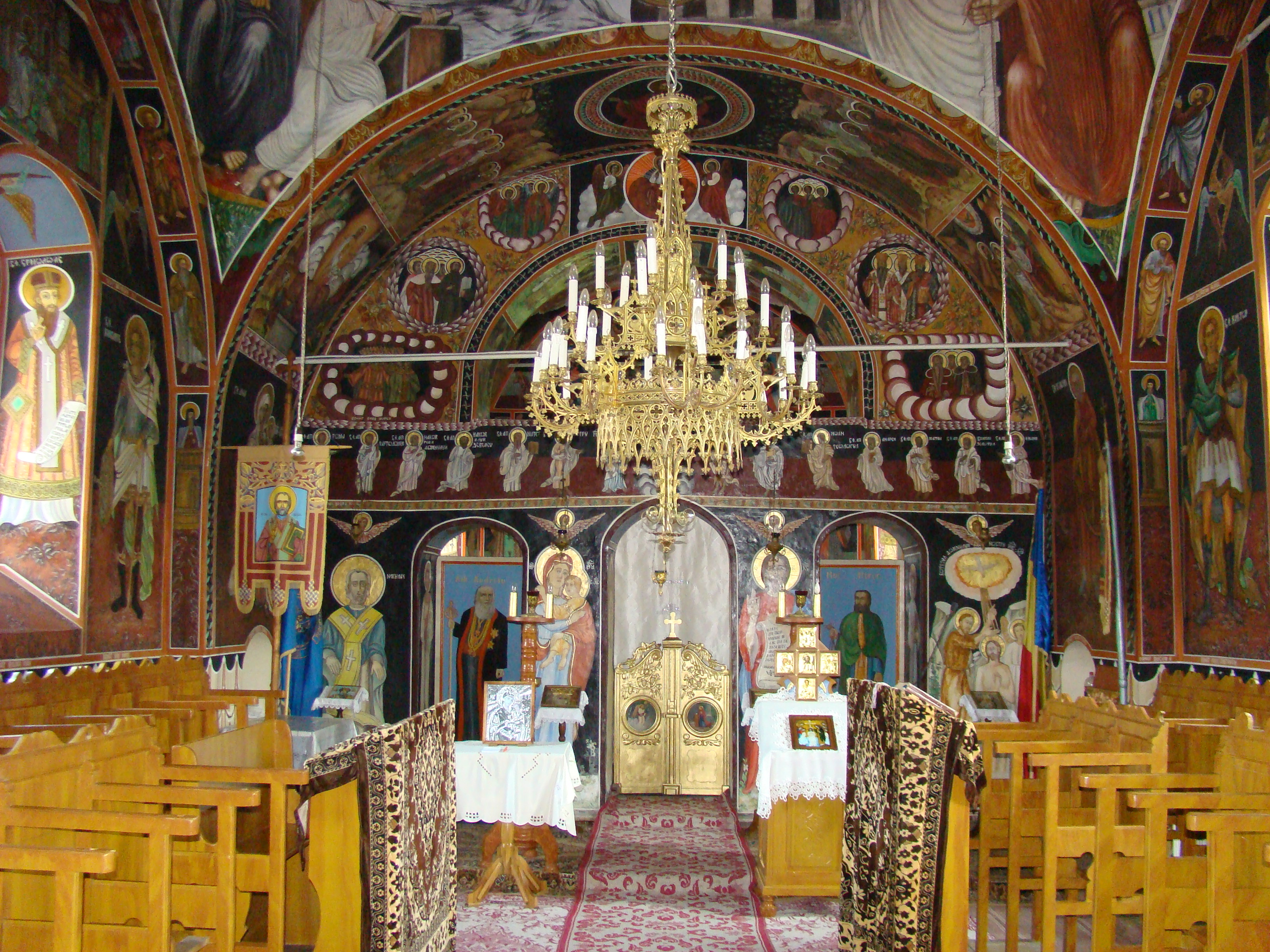 Biserica "Botezul Domnului" din Săcădate, oraș Avrig, județul Sibiu